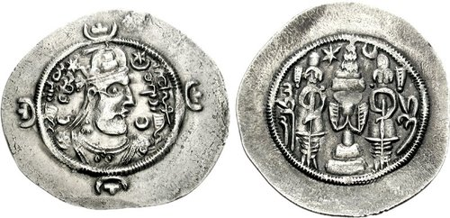 Dracma de Bistam cunhado em Rei em 595/596